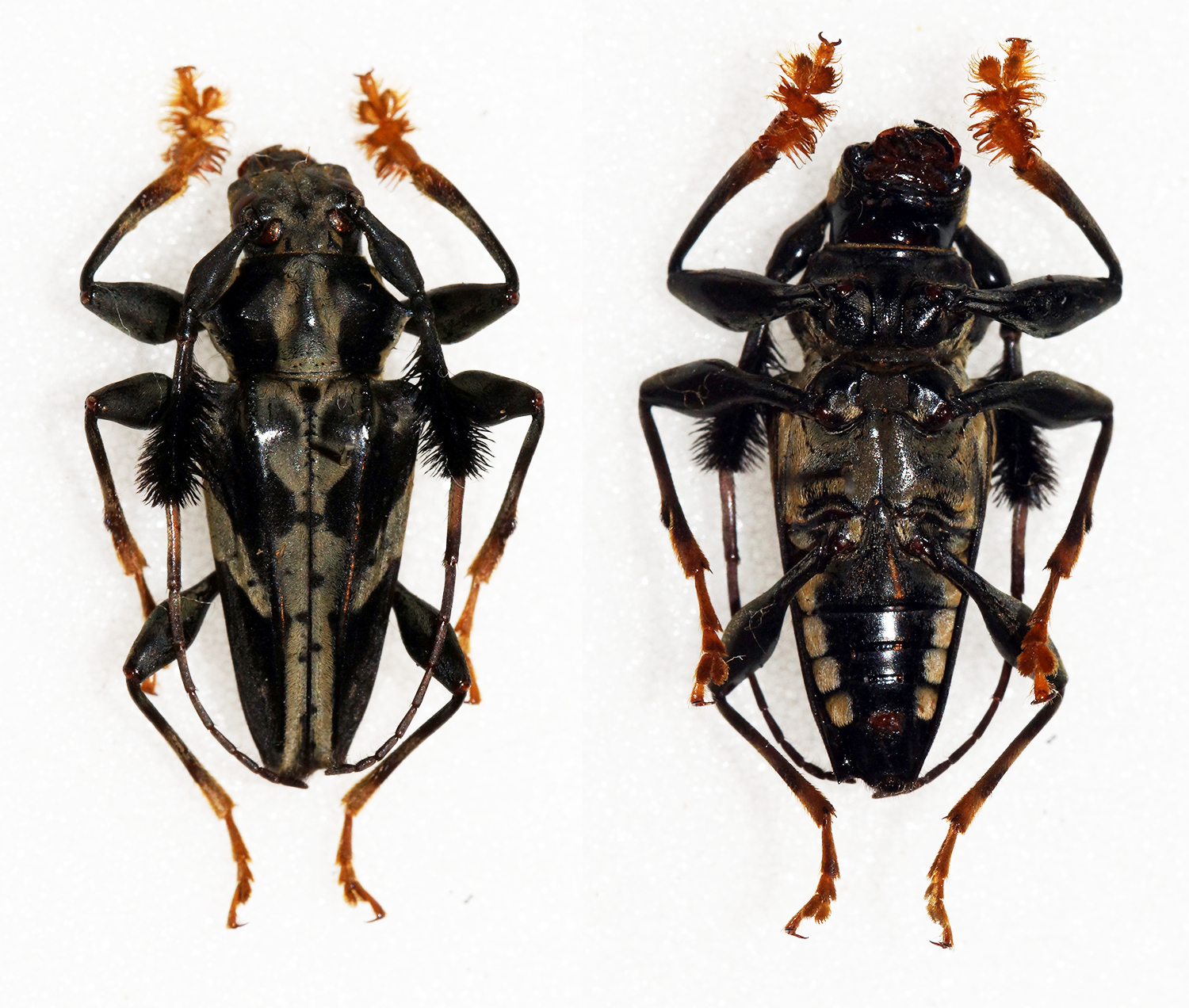 Bates,1880 Sex: ? Data: 10-2010 - Picuruyacu - Loreto - Peru Size: 17mm